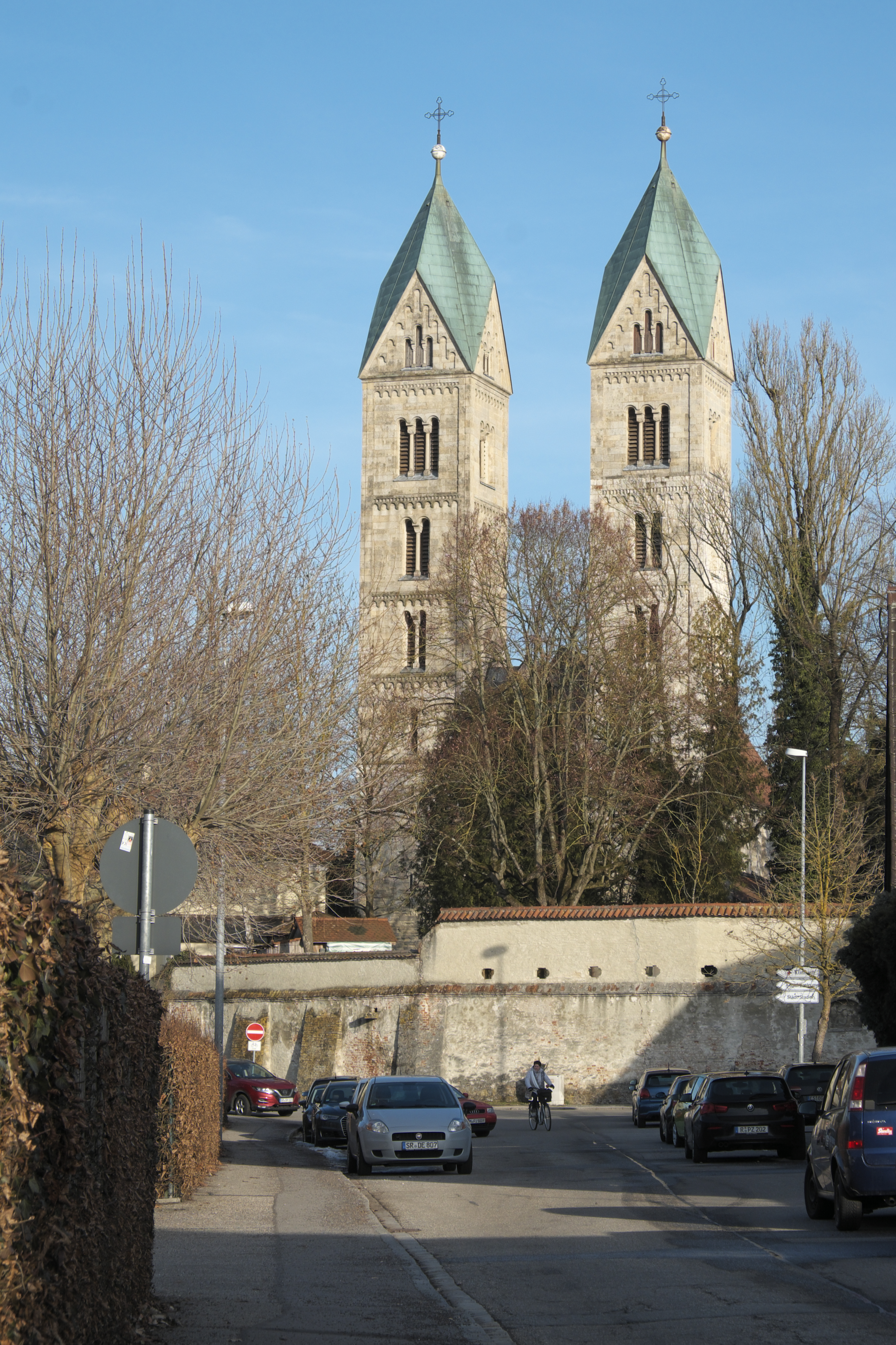 Alte katholische Pfarrkirche St. Peter in Straubing (Bayern/Deutschland), Westtürme, im Vordergrund Friedhofsmauer